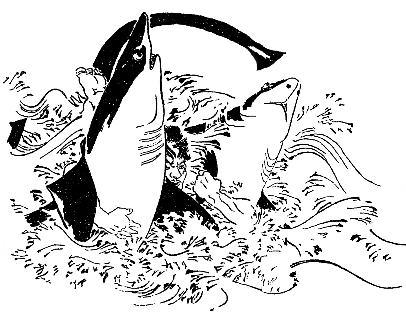 朝比奈義秀（和田義秀）。平安時代末期 - 鎌倉時代初期の武将。／江戸時代『前賢故実』より。画：菊池容斎